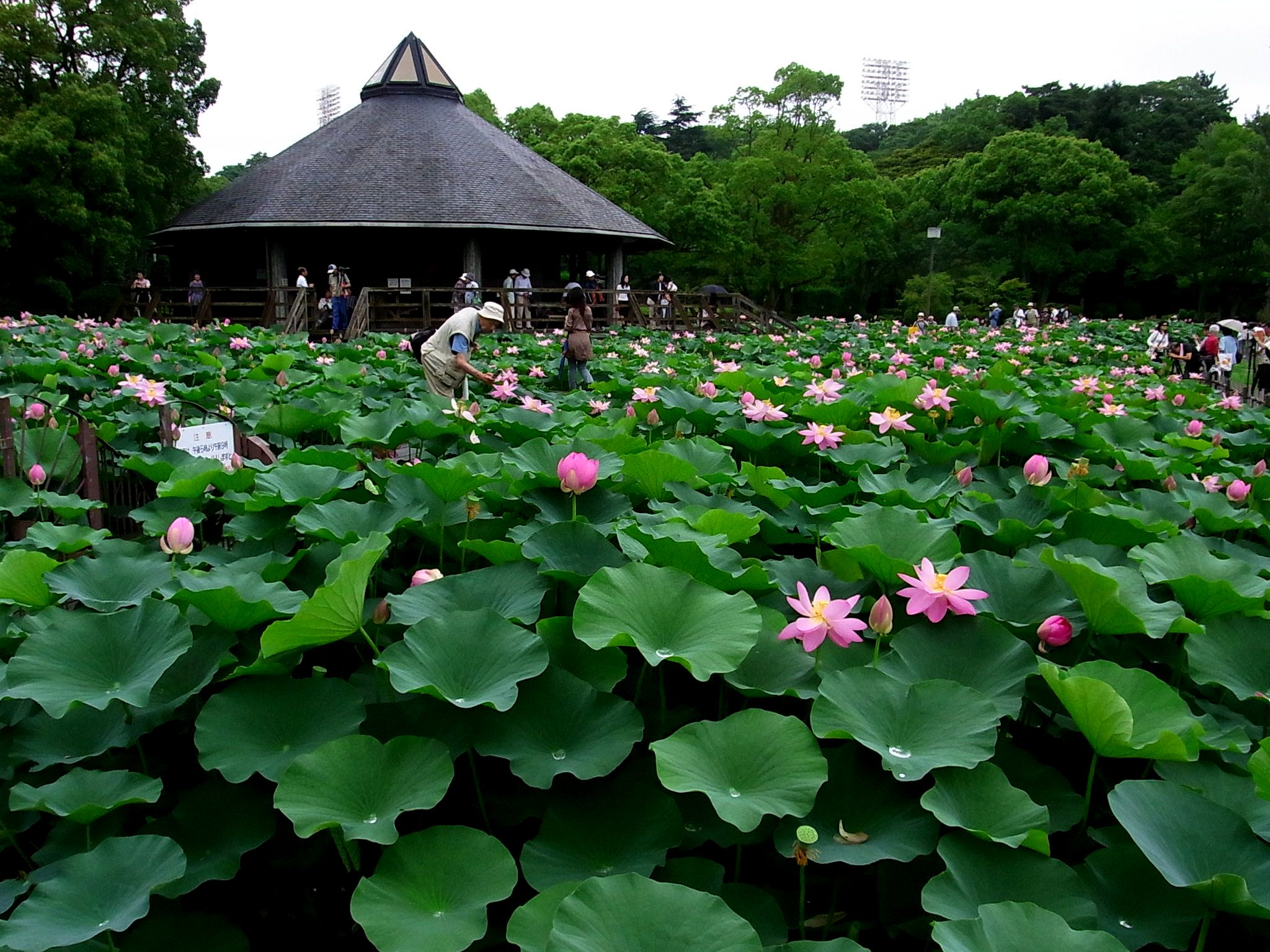 千葉県千葉市中央区弁天、千葉公園内の古代蓮（大賀蓮） Ricoh CX1